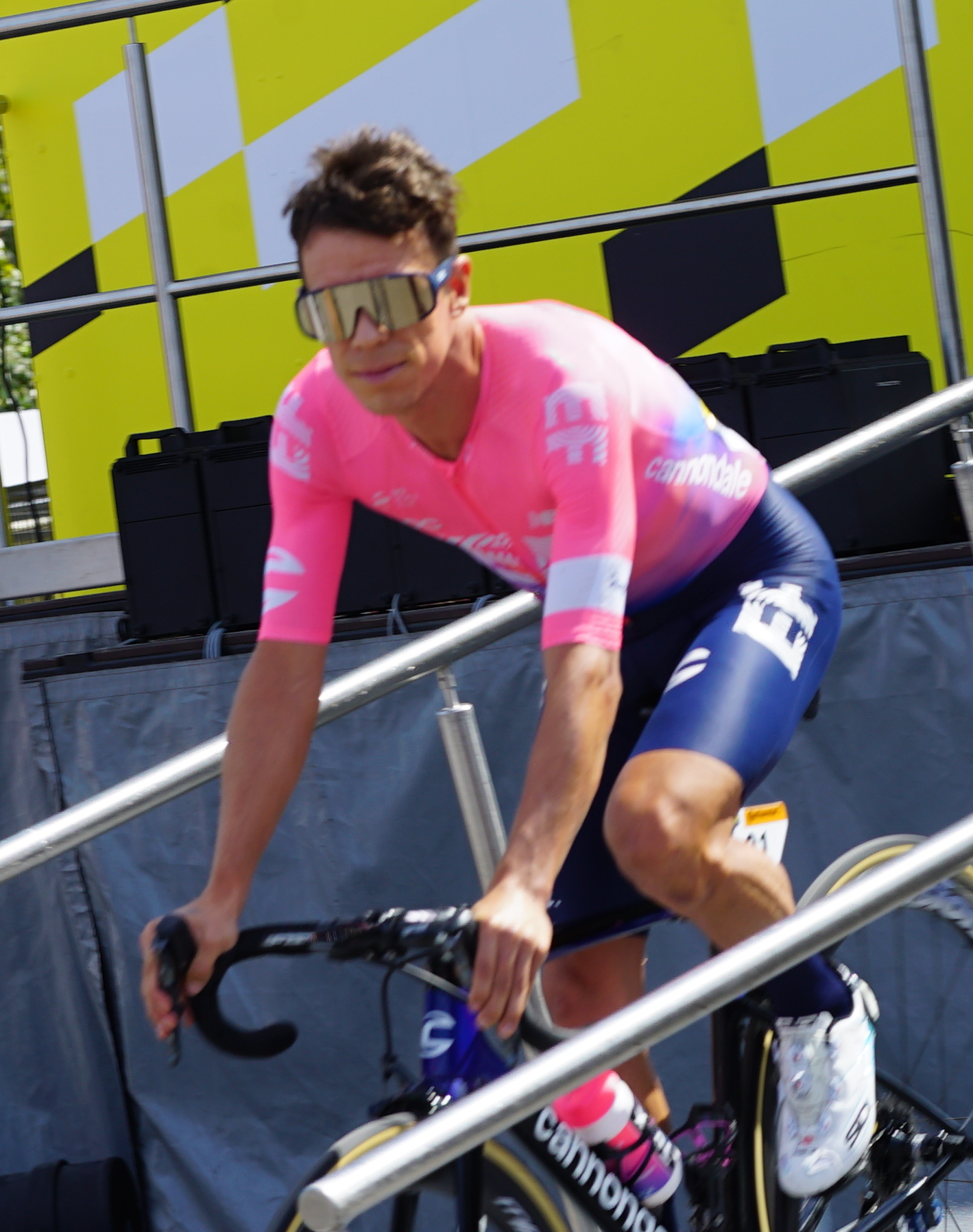 à Reims lors de la quatrième étape.